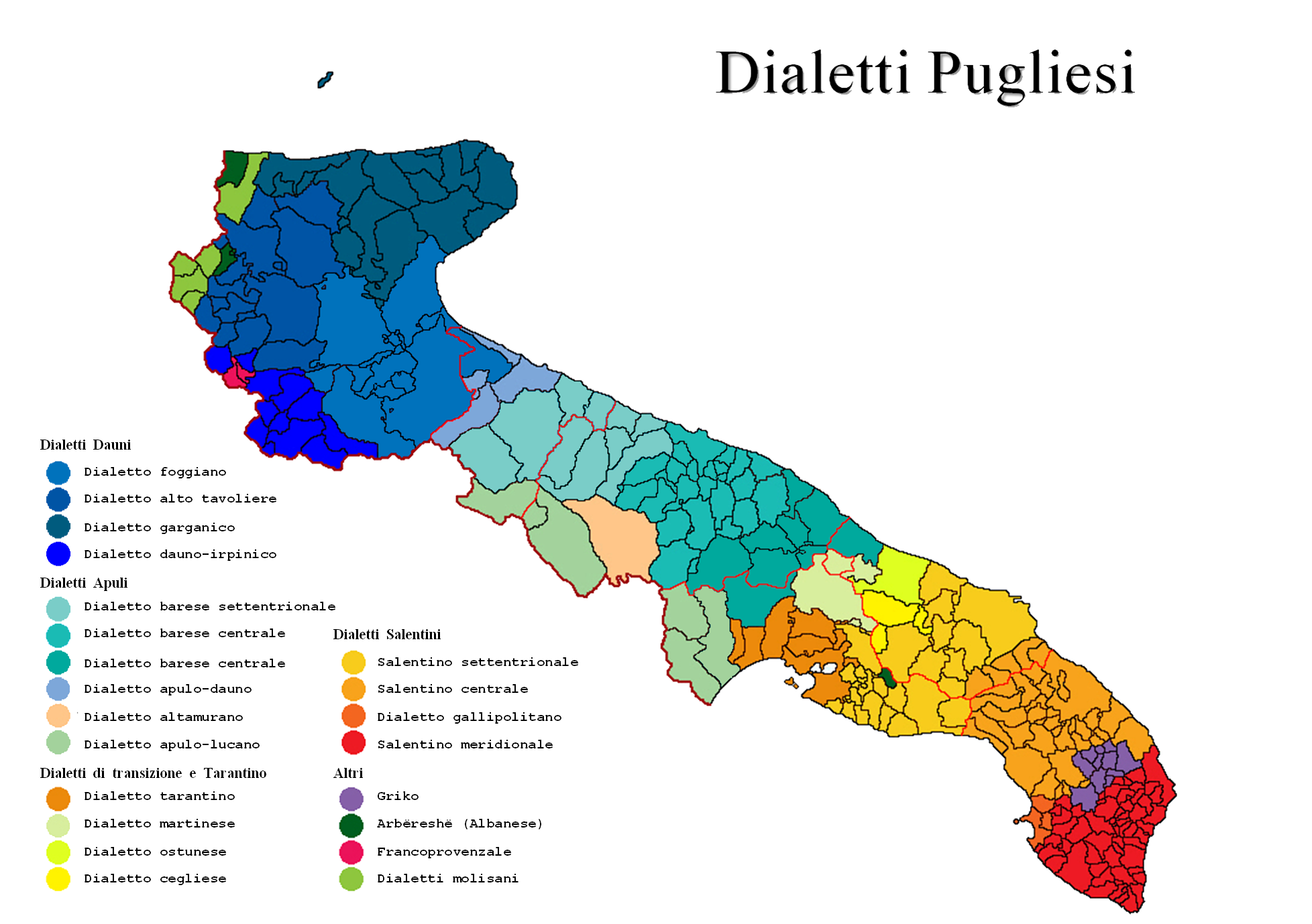 Dialetti Pugliesi